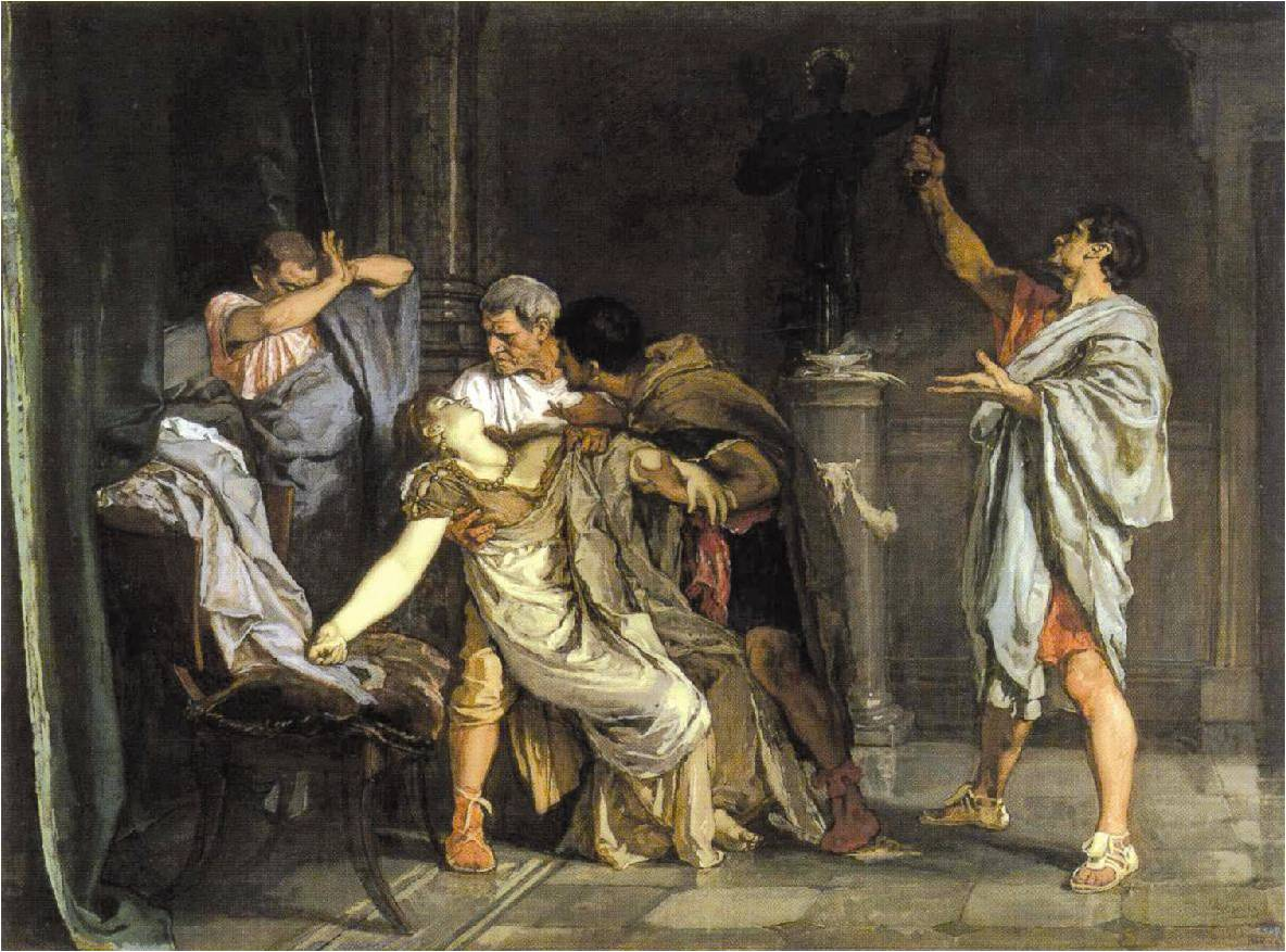 La muerte de Lucreciatitle QS:P1476,es:"La muerte de Lucrecia" label QS:Les,"La muerte de Lucrecia"